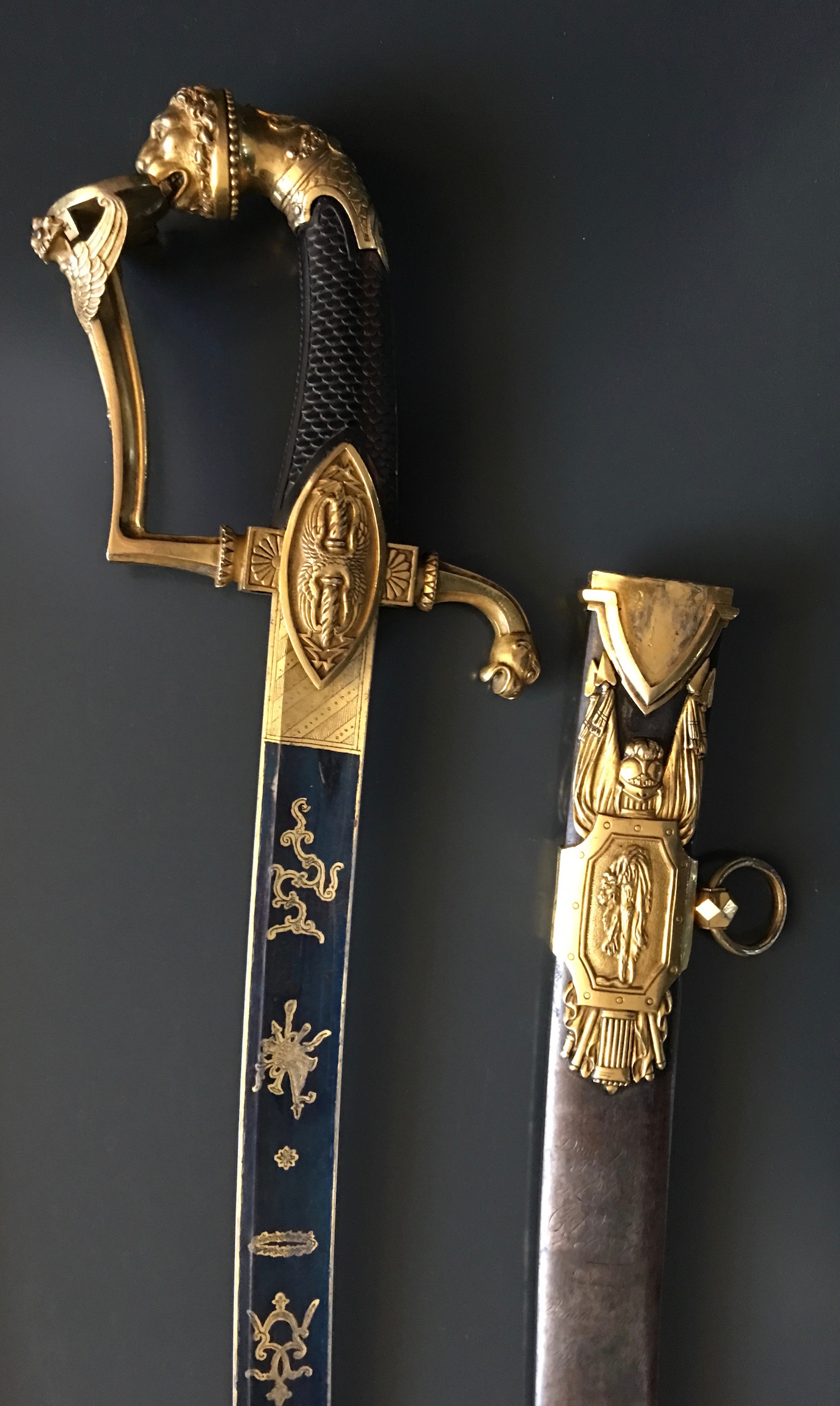 Sabre donné par Napoléon Bonaparte à Antoine Louis Popon MAUCUNE.